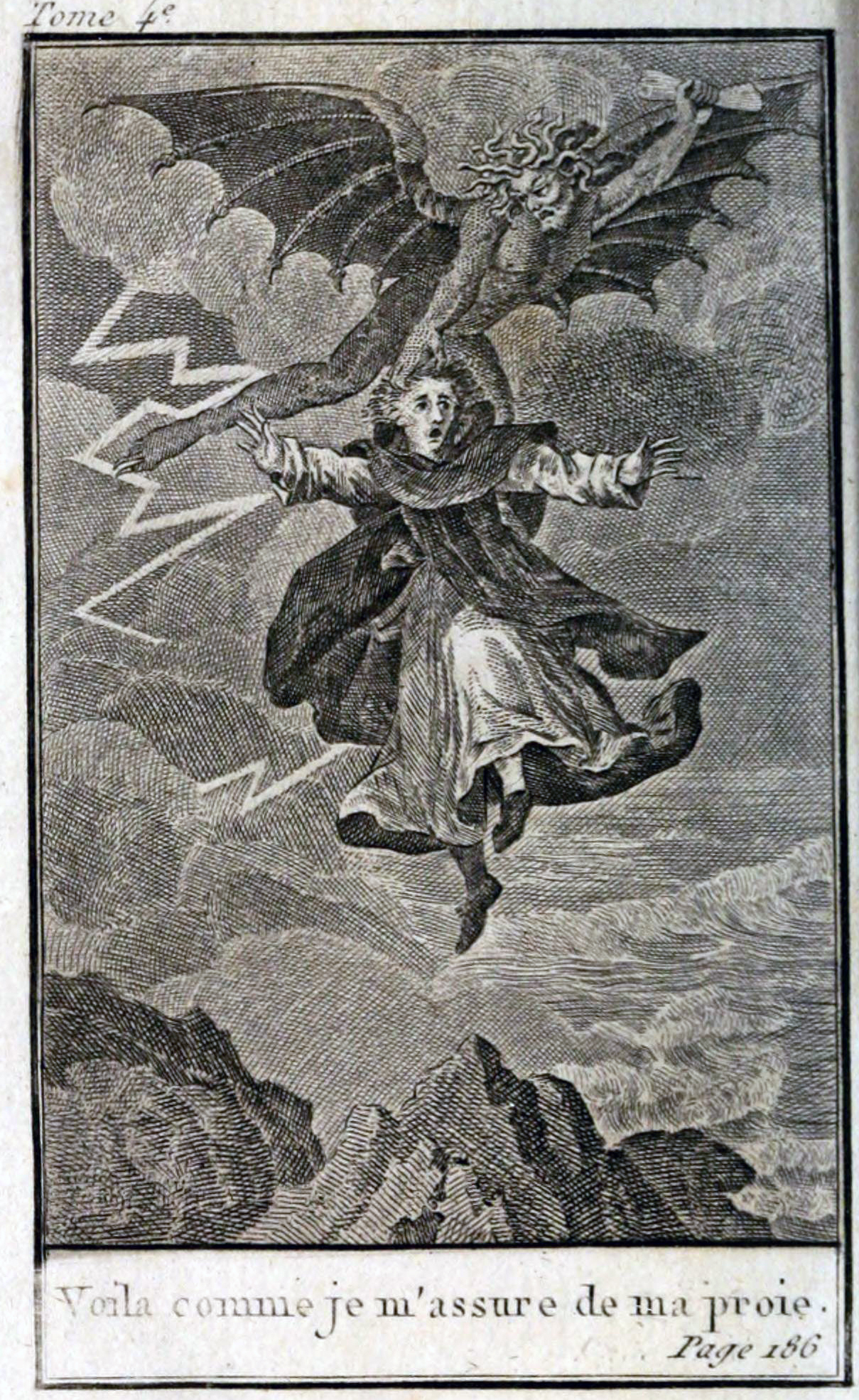 frontispice du tome 4 du livre le Moine traduit de l'anglais, de Matthew Gregory Lewis, Maradan, 1811 en 4 tomes